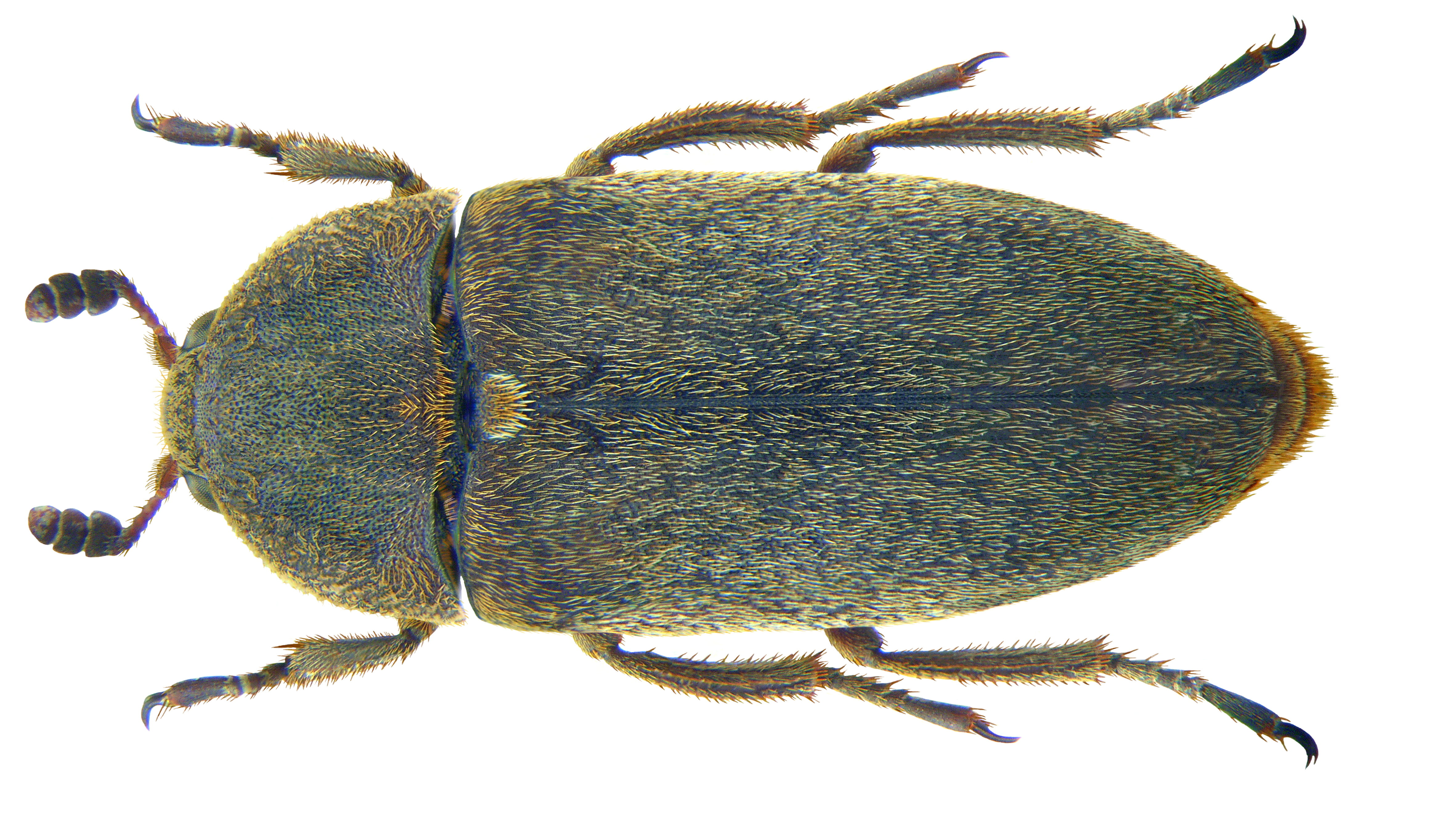 Dermestes maculatus DeGeer, 1774 Familie: Dermestidae Groesse: 5,5-10 mm Verbreitung: weltweit Ökologie: in tierischen Resten, vorzugsweise synanthrop Fundort: Senegal, M`Bour leg. U.Schmidt, 1992; det. J.Háva, 2009 Foto: U.Schmidt, 2009